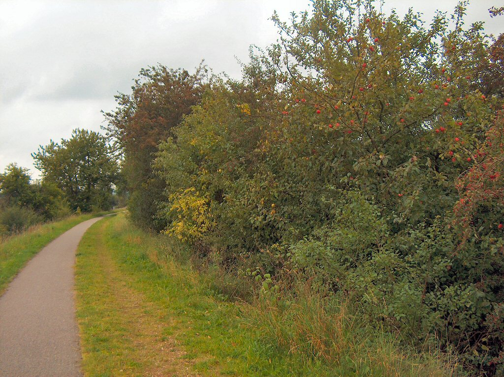 Del af naturstien Horsens-Silkeborg med asfaltsti og ridesti